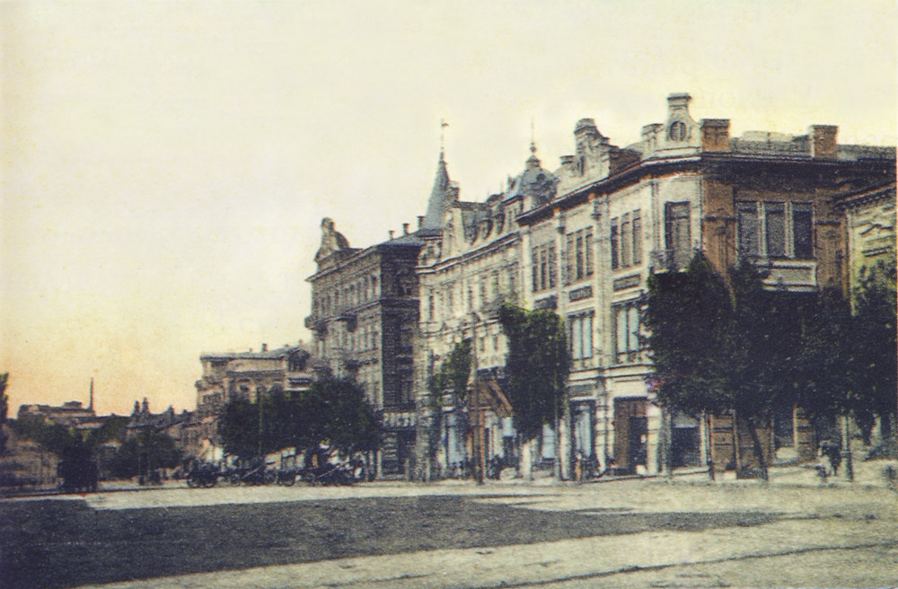 Доходный дом Бахчисарайцева Григория Христофоровича